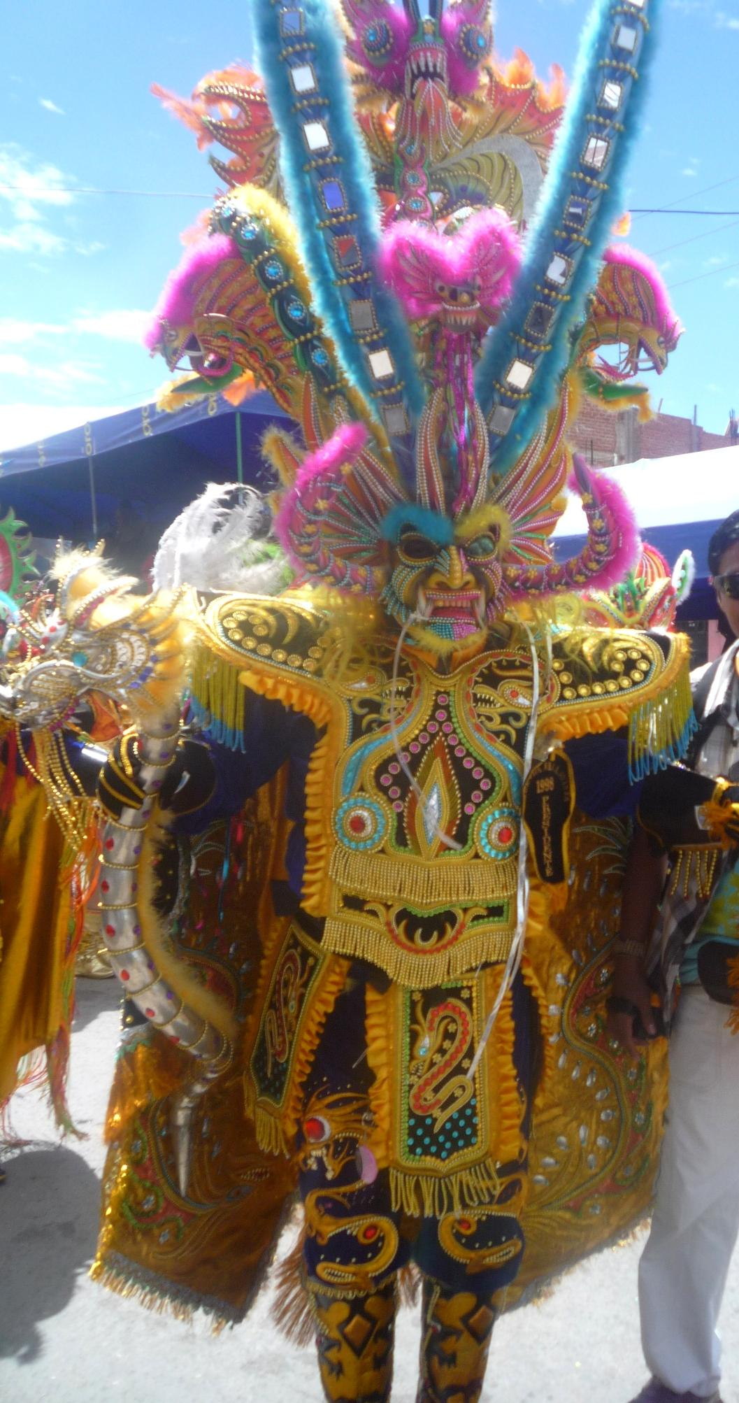 Diablada Puneña - Peru. Festividad Virgen de la Candelaria 2013